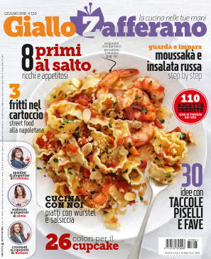 Copertina della rivista Giallo Zafferano giugno 2018, Arnoldo Mondadori Editore.